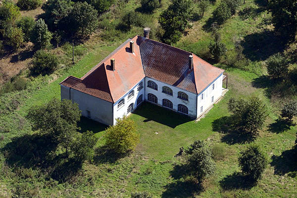 Taródházai kastély, Sorkifalud